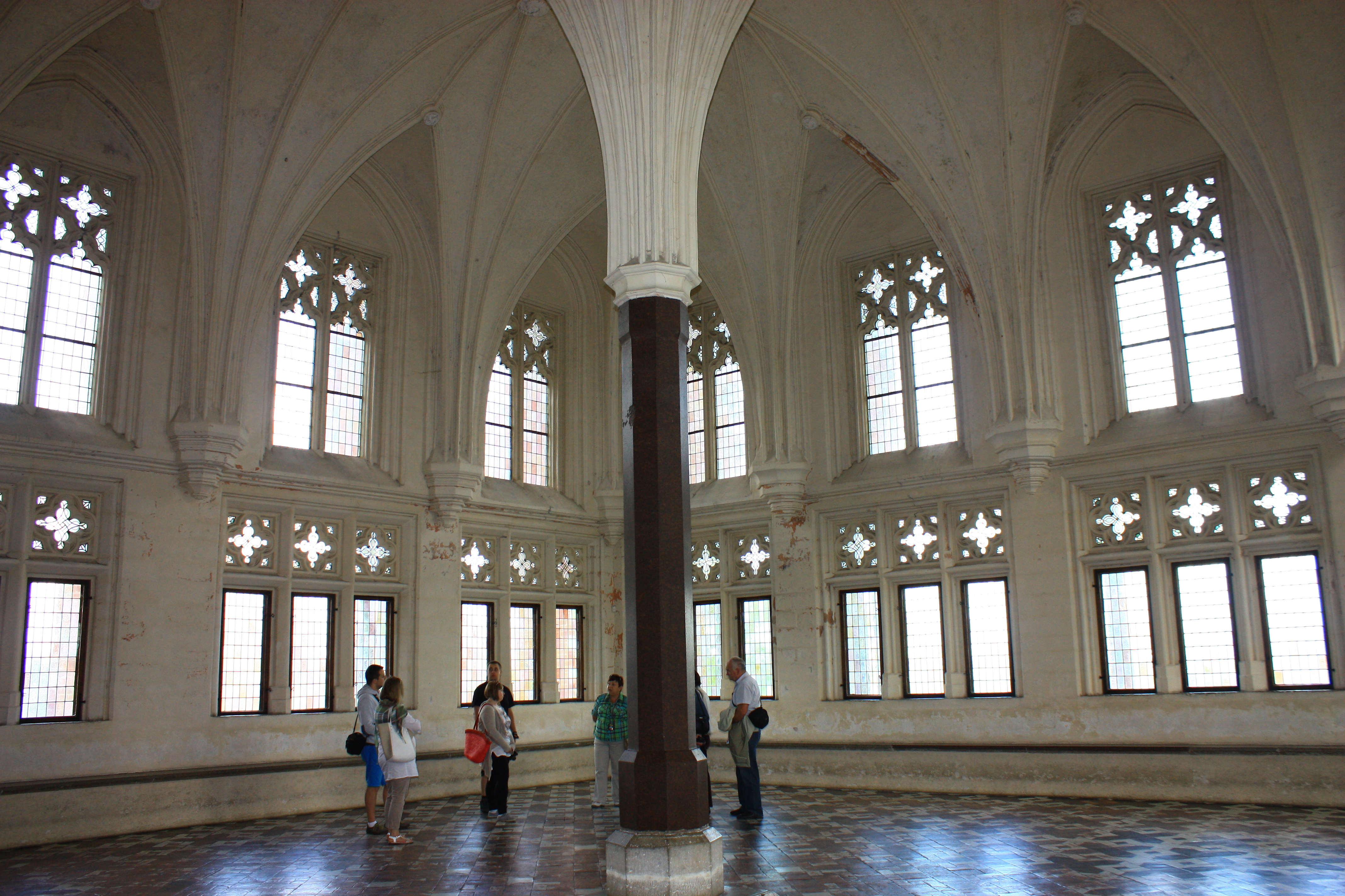 Malbork, zespół zamku krzyżackiego, XIII, XIX